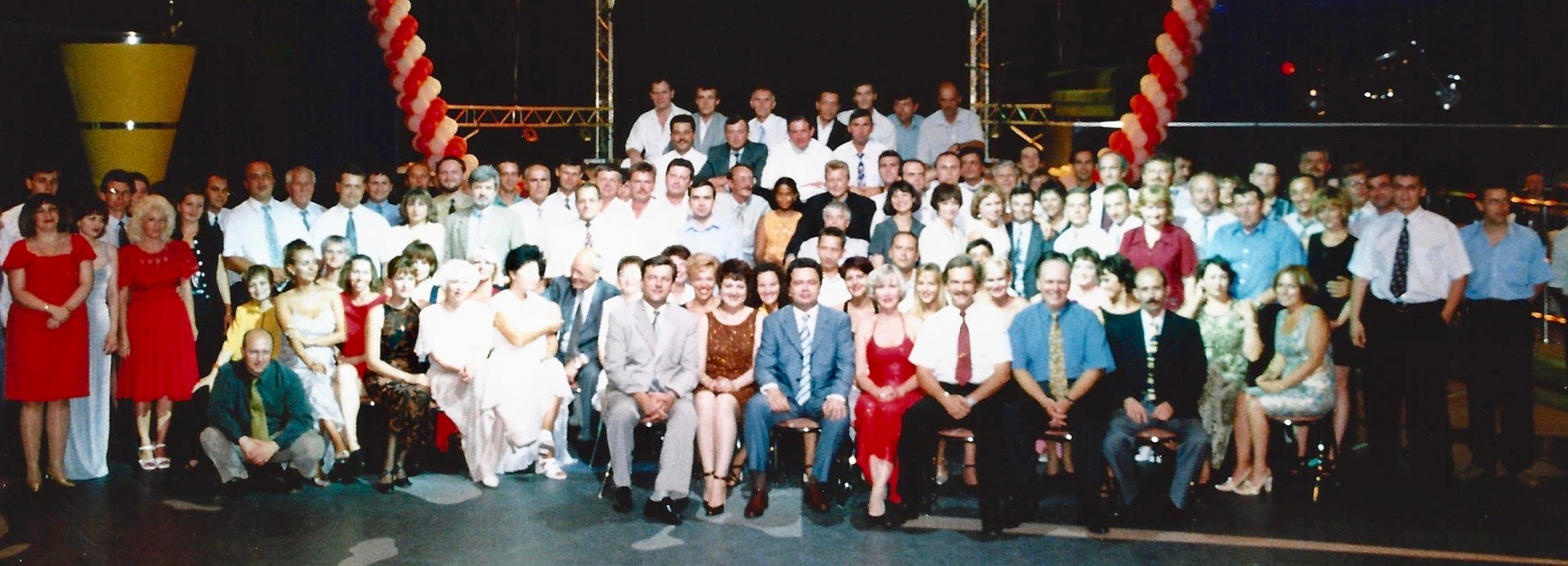 День заснування фірми ІнтерАМІ традиційно відзначалося щороку 1-го серпня